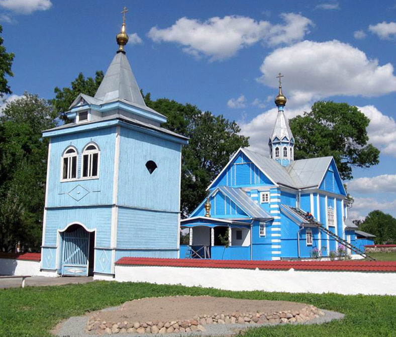 Беларуская (тарашкевіца): Чарнаўчыцы